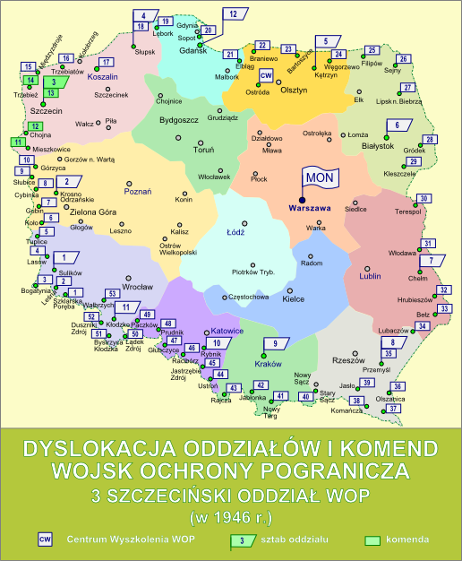 Dyslokacja oddziałów i komend Wojsk Ochrony Pogranicza w październiku 1946 r. - 3 Szczeciński Oddział WOP